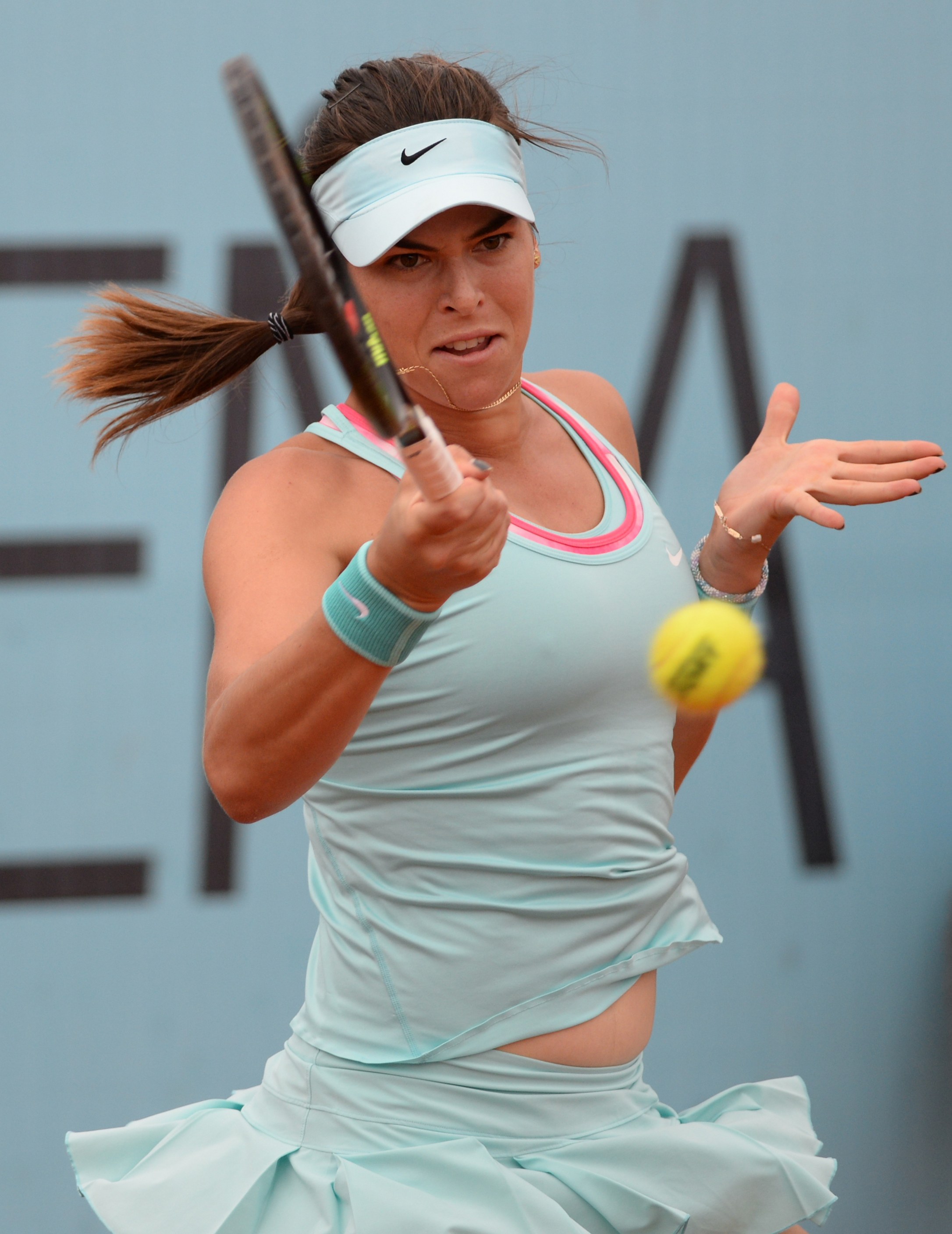 Ajla Tomlanovic